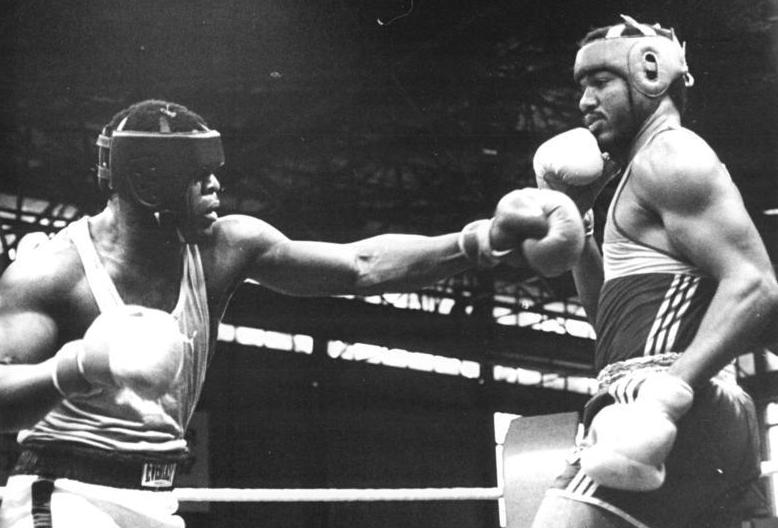 Ikomonya Biko Botowamungu, Jorge Luis Gonzales ADN-ZB Lehmann 29.3.87 Halle: XVI. Internationales Chemiepokalturnier im Boxen-Finale-Beim immer reizvollen Duell der Superschwergewichtler triumphierte mit Jorge Luis Gonzales (r.) aus Kuba zum Schluß der bessere Techniker über den schlagstarken Ikomonya Biko Botowamungu )Österreich). Der in Zaire gebürtige Sportler unterlag einstimmig nach Punkten.